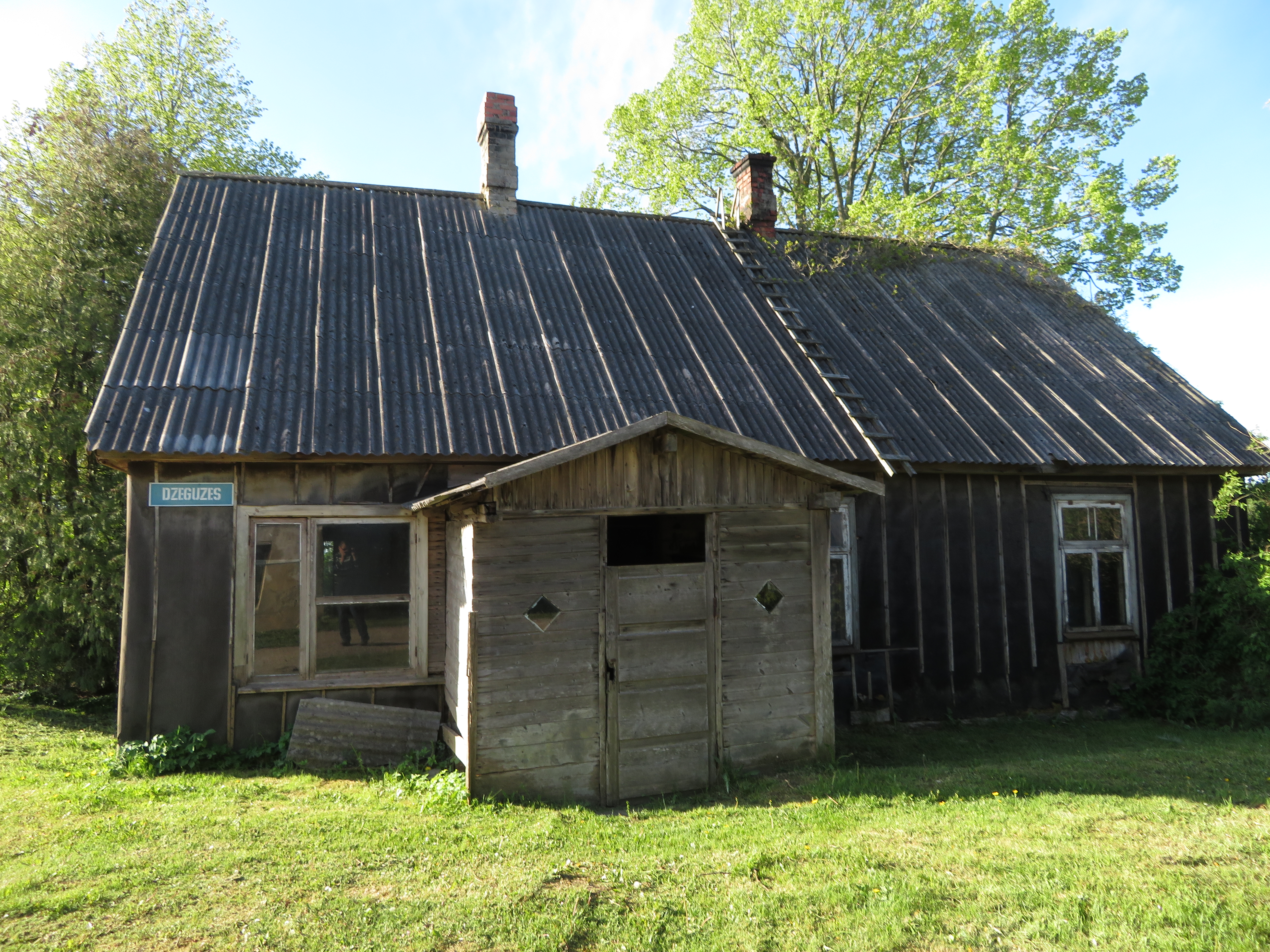 Dzeguzes (Smārdes pagasts)